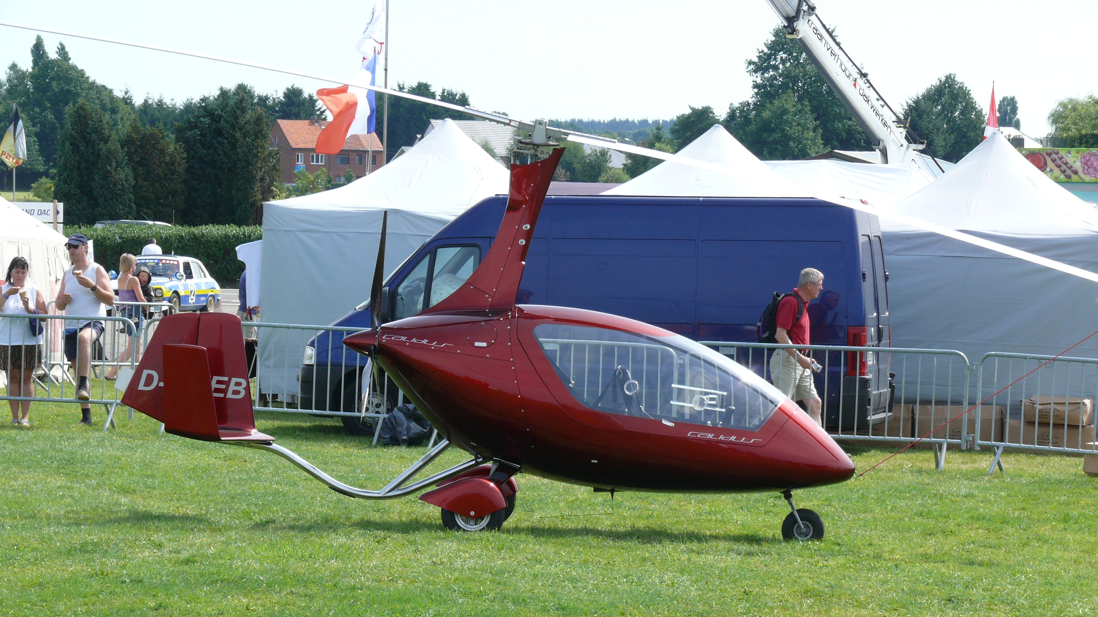 AutoGyro Europe Calidus D-MTEB op de Schaffen Fly and Drive In 2012